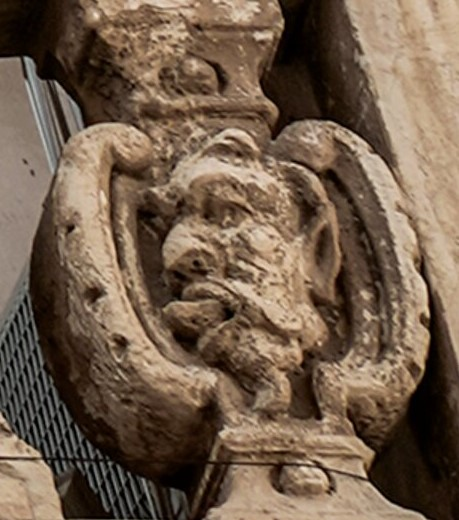 derivato da